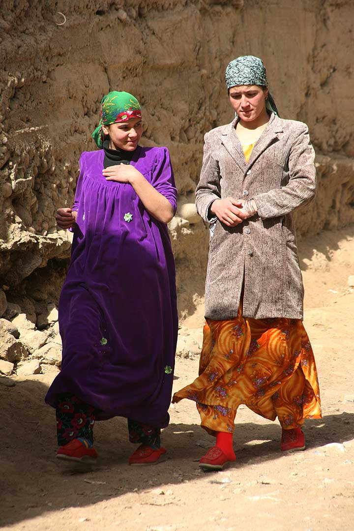 Tajik girls